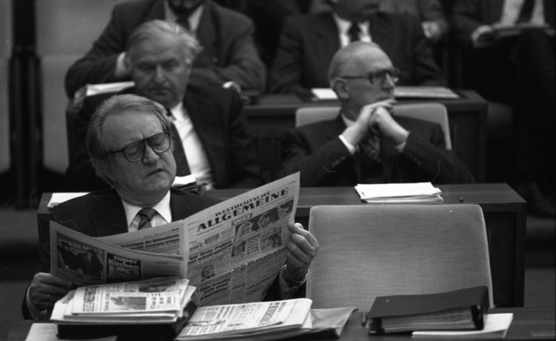 26.2.1988 Bundesratssitzung